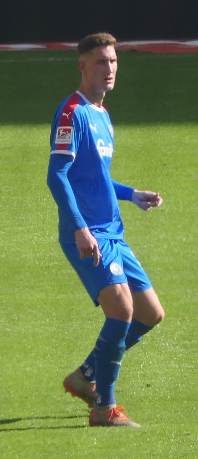 Der Fussballprofi Phil Neumann im Trikot von Holstein Kiel beim Auswärtsspiel gegen den VfB Stuttgart am 20.10.2019.